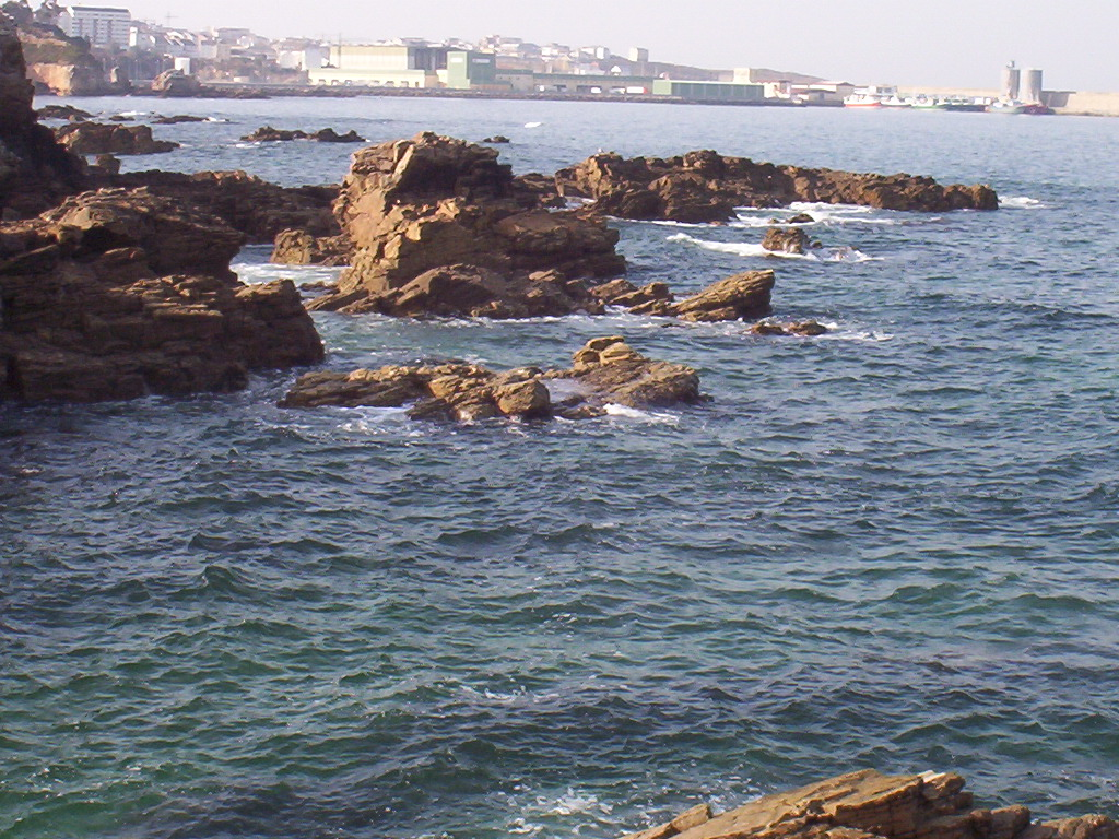 Imagen del puerto de burela